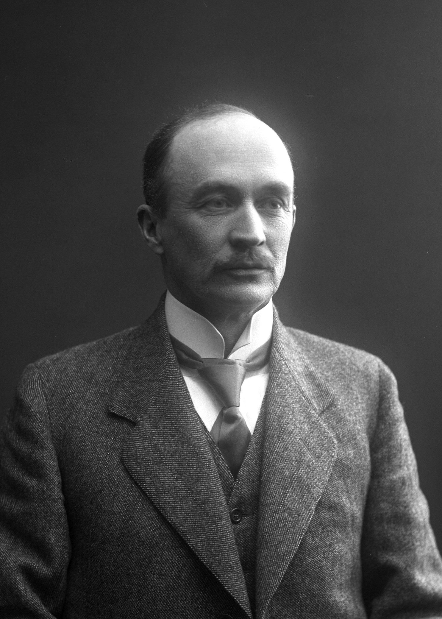 Johan Egeberg Mellbye (1866–1954), statsråd, stortingsmann og gårdbruker på Grefsheim på Nes i Hedmark.